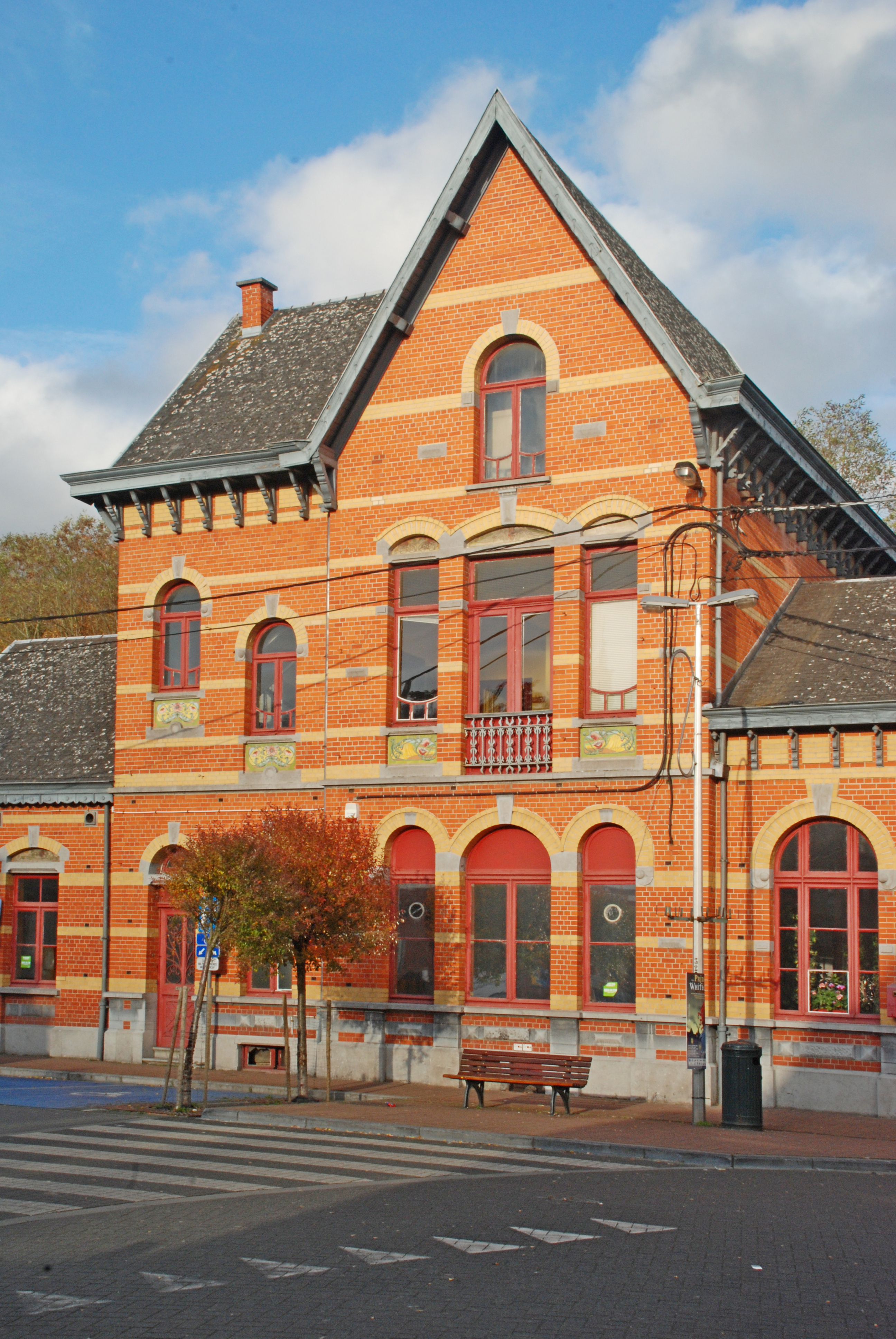 Gare de Genval (Art nouveau)